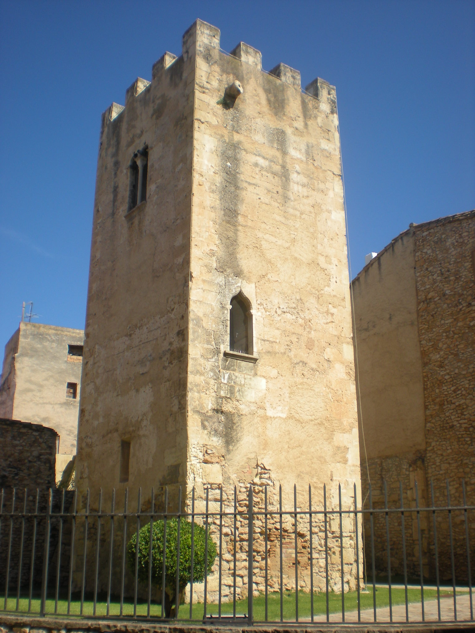 Torre de la Vila i restes de muralles de Torredembarra